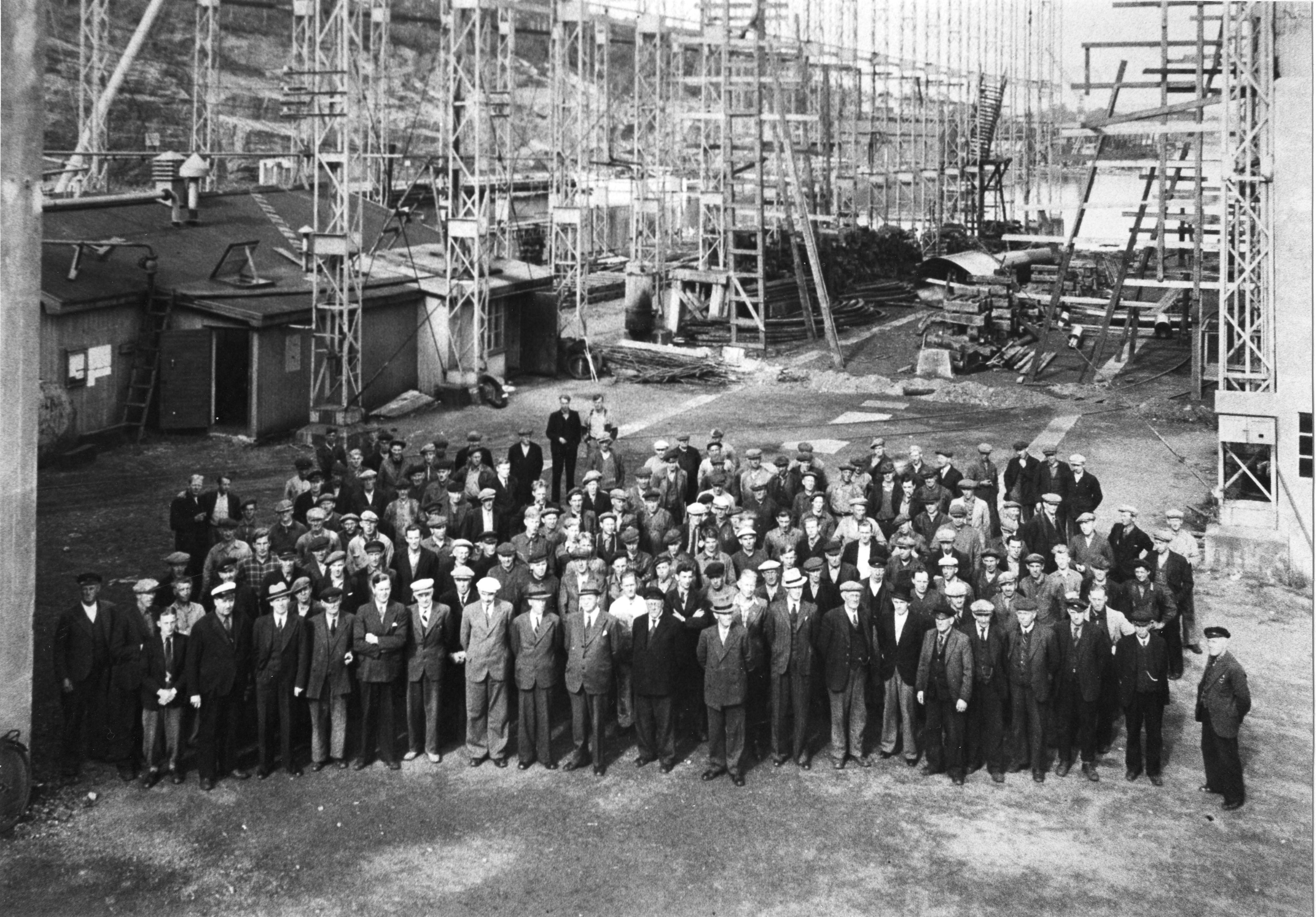 Ansatte ved Langesund mekaniske verksted I 1942